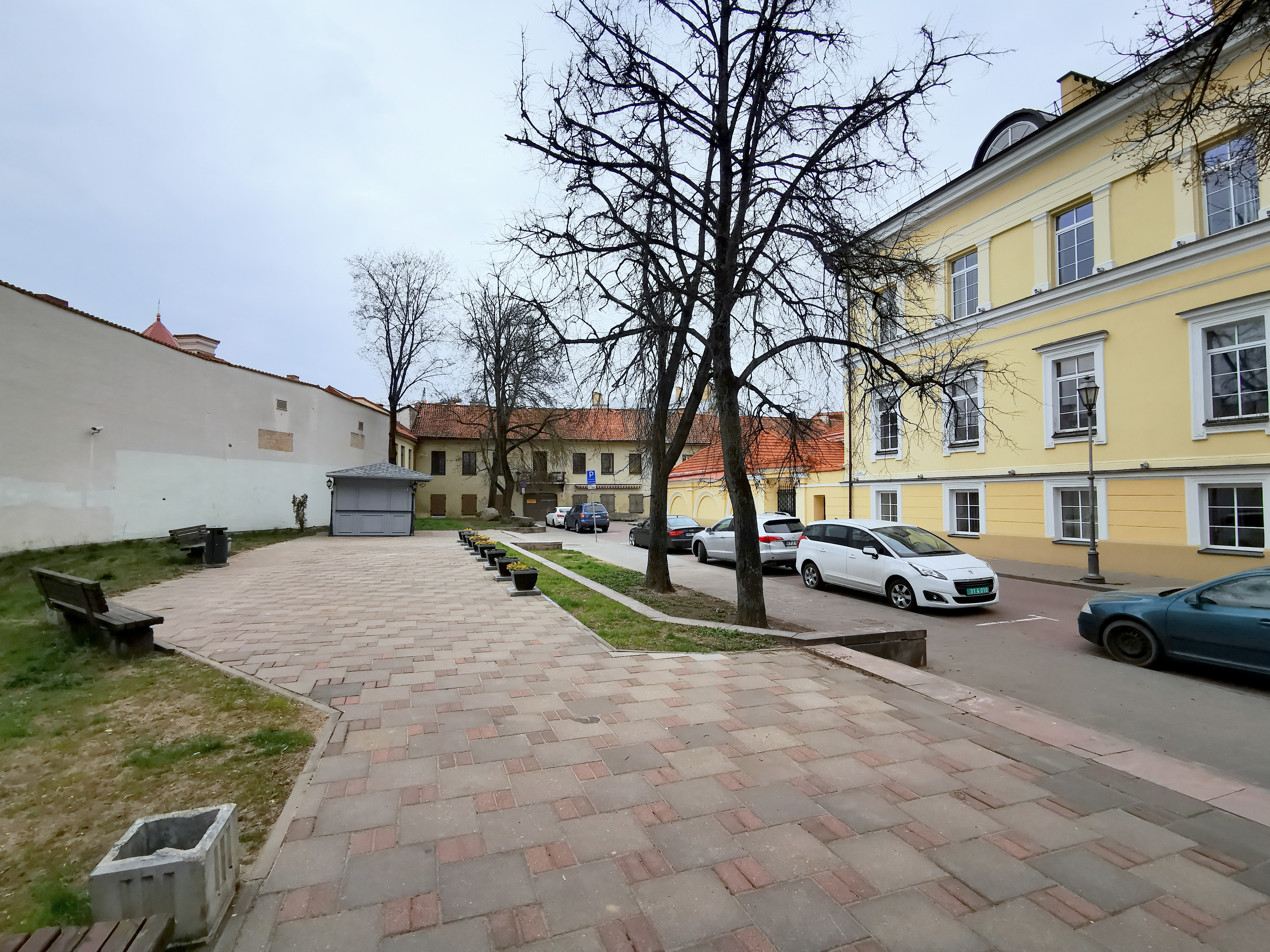 Andriaus Volano gatvė